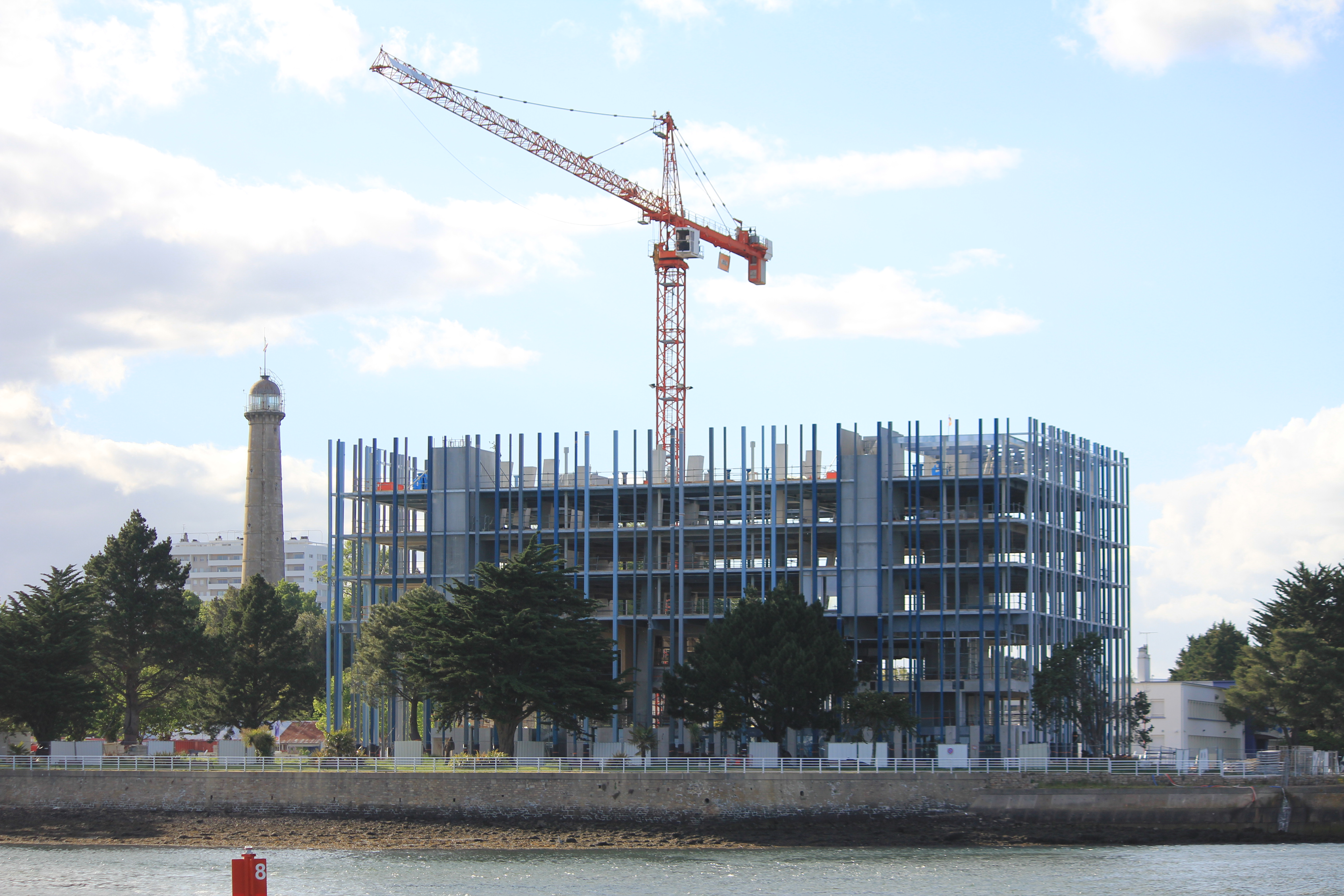 Hotel d'agglomération de Cap Lorient en construction en mai 2013